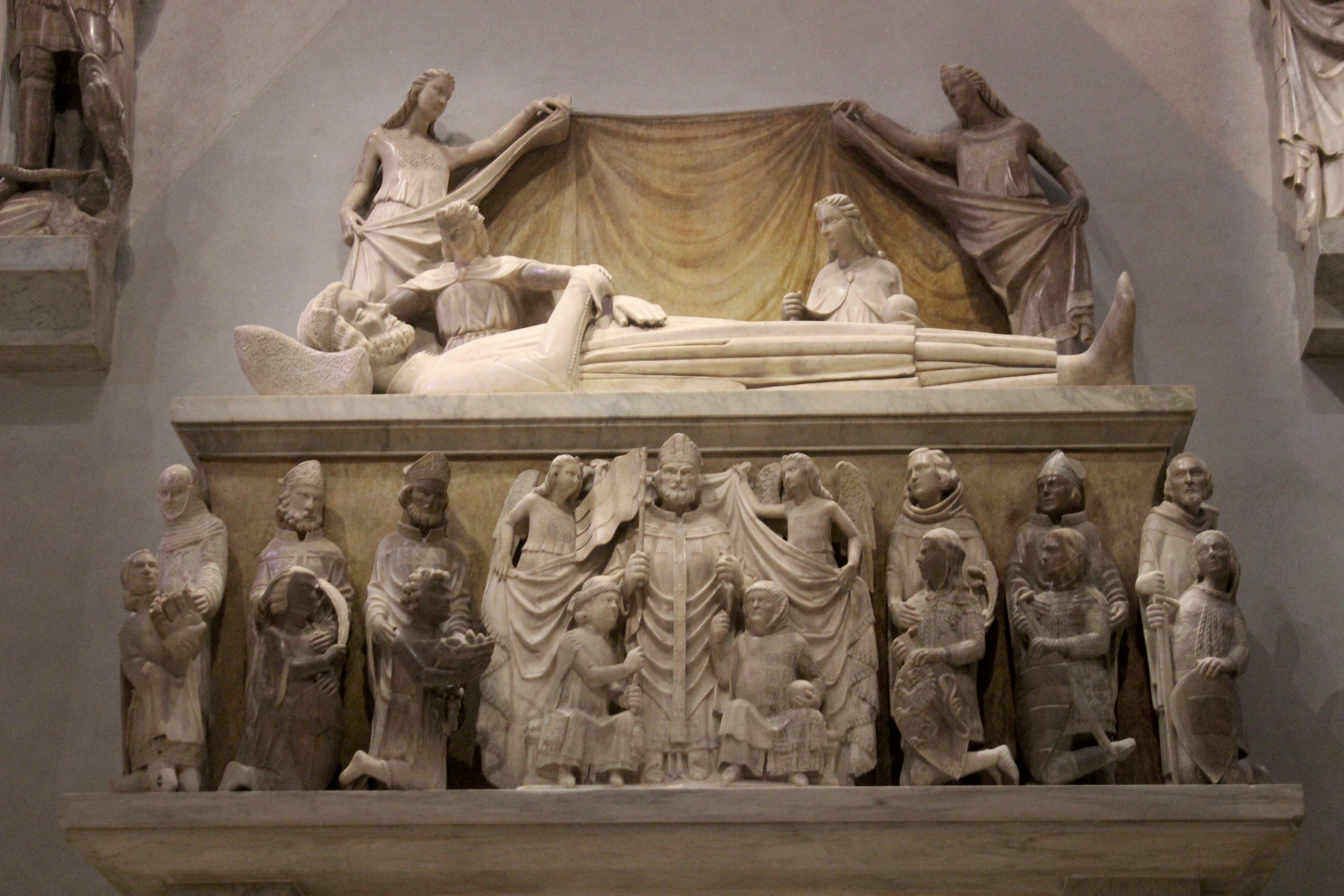 Milán, San Gottardo. Tumba de Azzone Visconti.